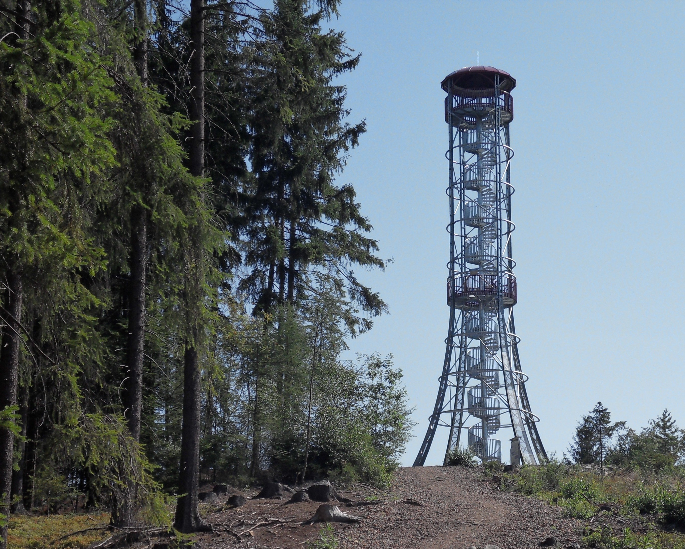 Rozhledna "Kotel" u Rokycan.